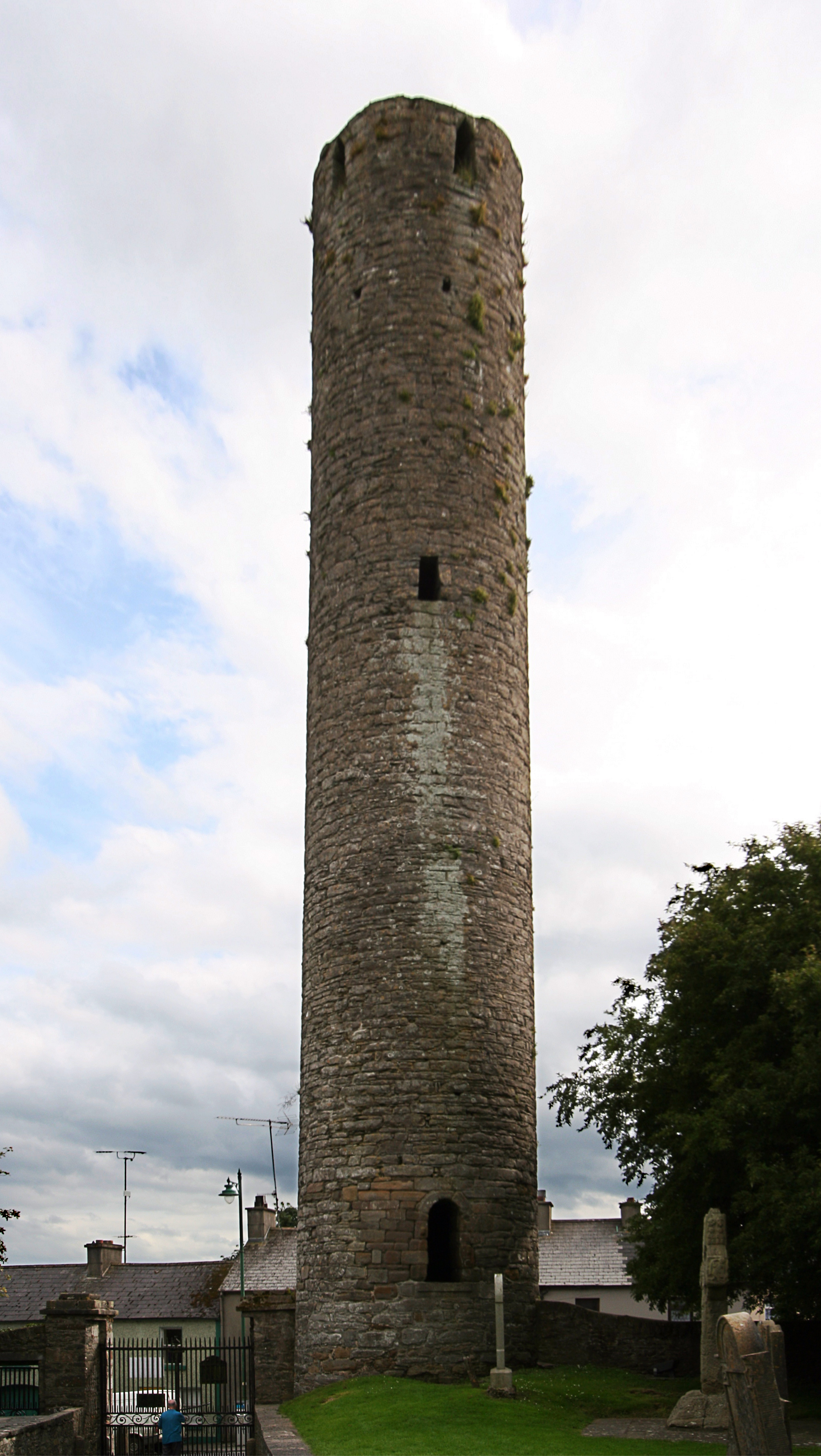 Kells AbbeyMonasterio de Kells